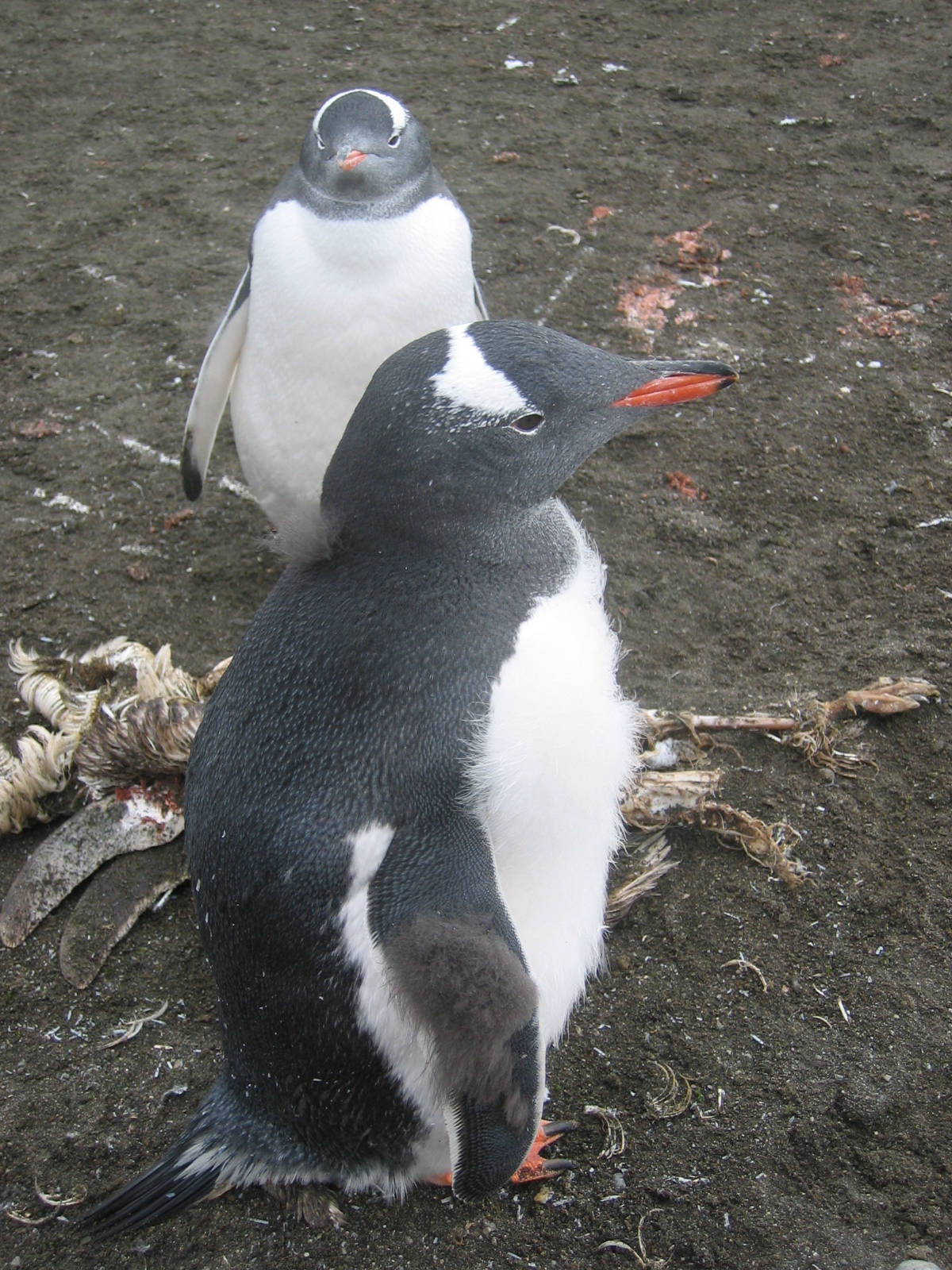 moulting young Pygoscelis papua on Aitcho Island